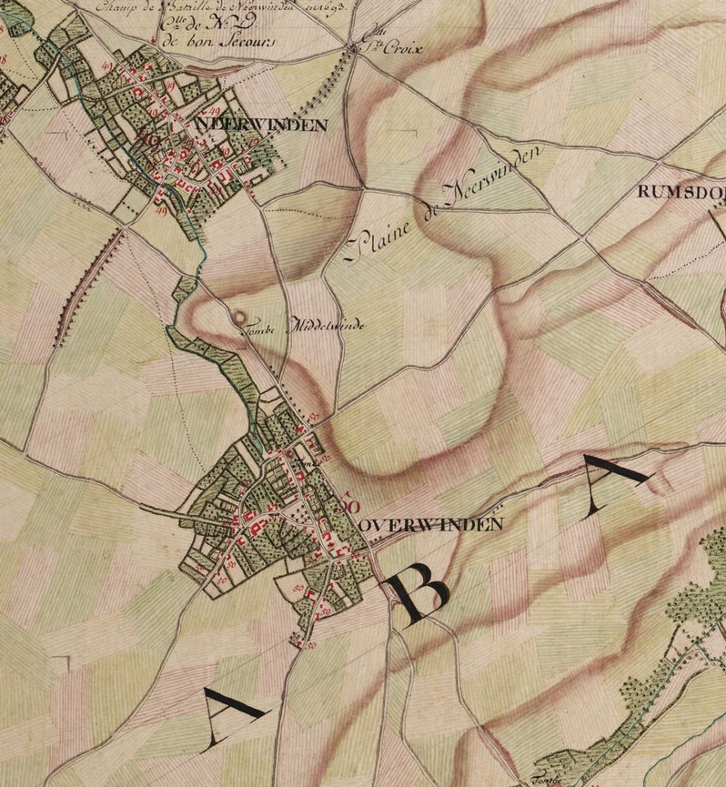 Extrait de la carte de Ferraris n° 133B